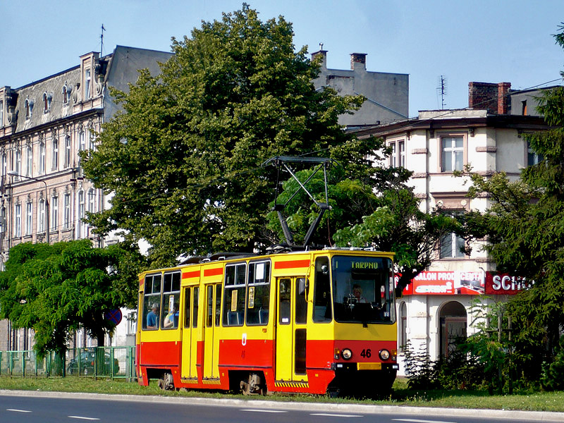 Tramwaj Konstal 805Na (#46) z 1983 roku na ul. Marszałka Ferdynanda Focha w Grudziądzu.